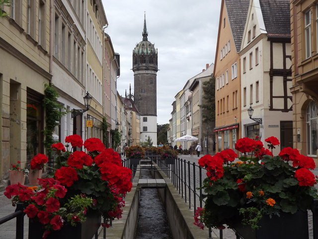 Wittenberg - Stadtbach in der Schlossstrasse (Town Stream in the Schlossstrasse)